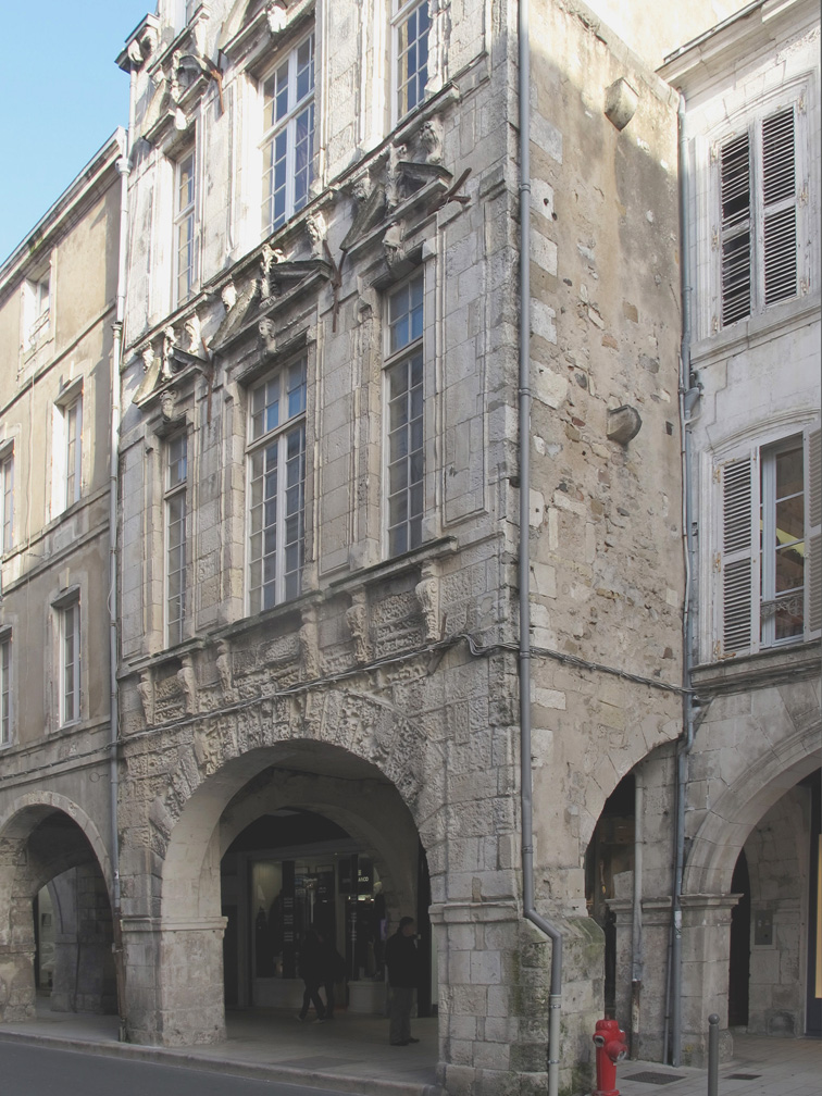 Rue en arcades, La Rochelle, France